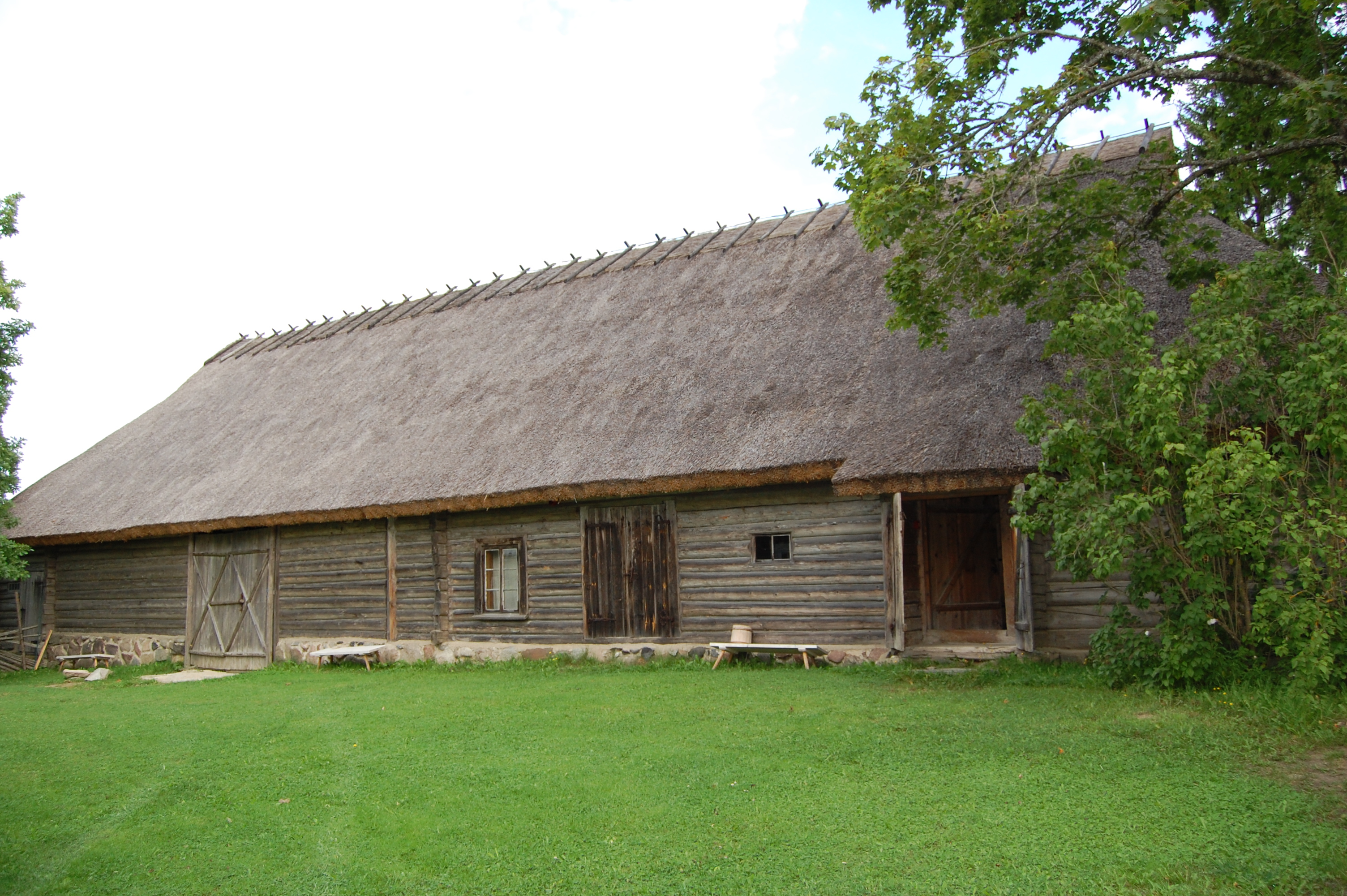 Vetepere küla Vargamäe